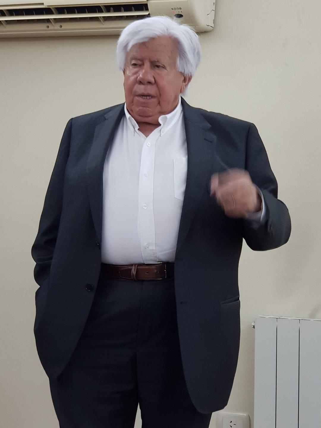 Daniel Pedro Cardinali en la Sociedad Argentina de Nutrición